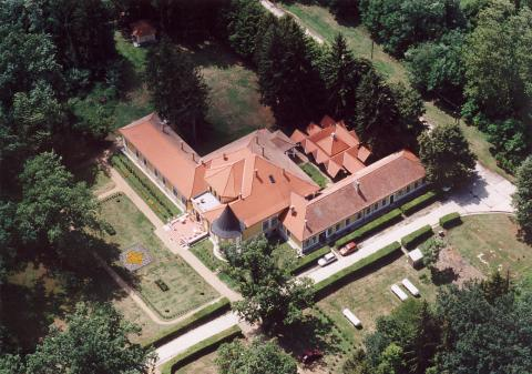 Görgeteg, Hungary, aerialphotography